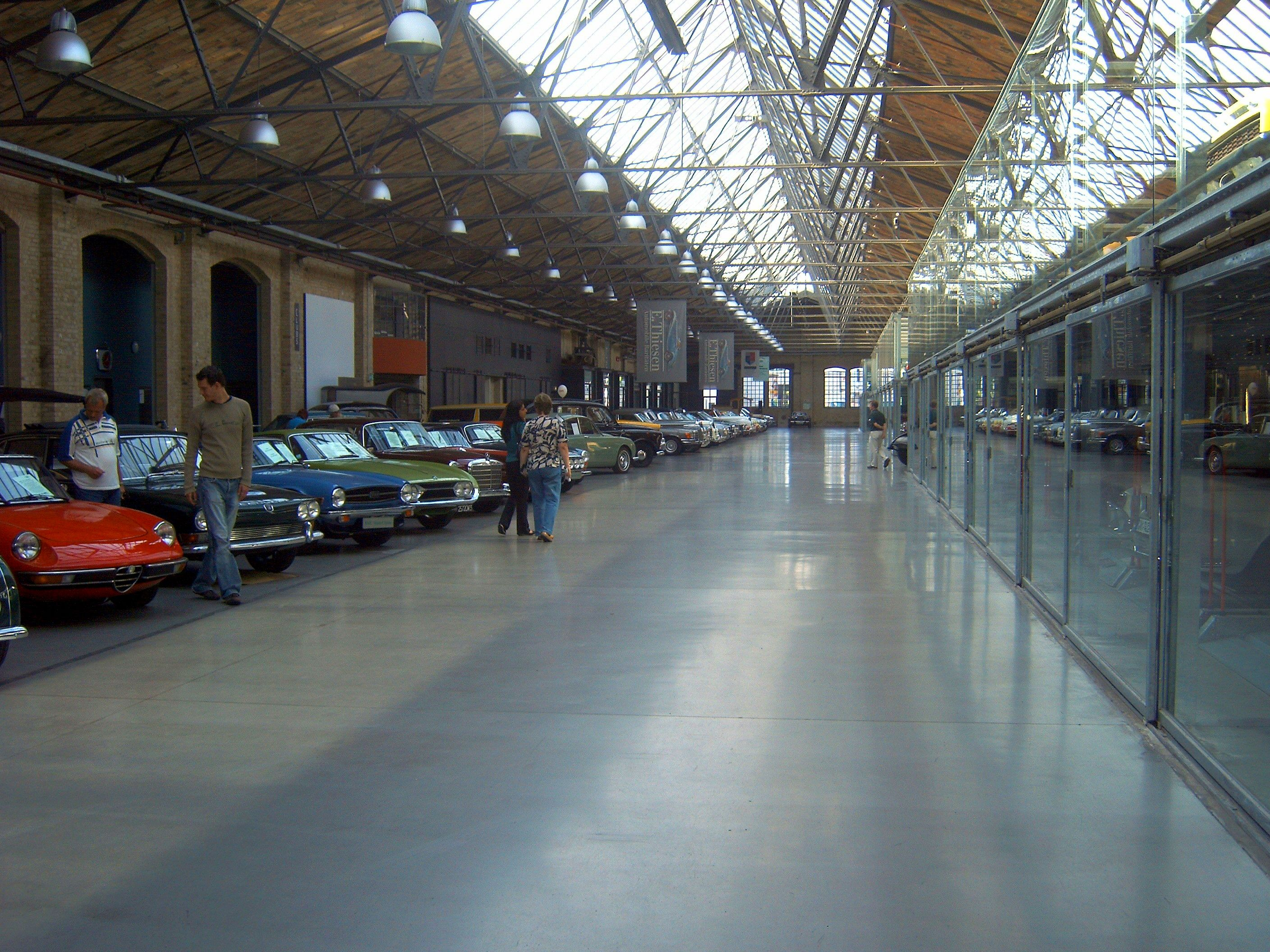 Meilenwerk Berlin von innen